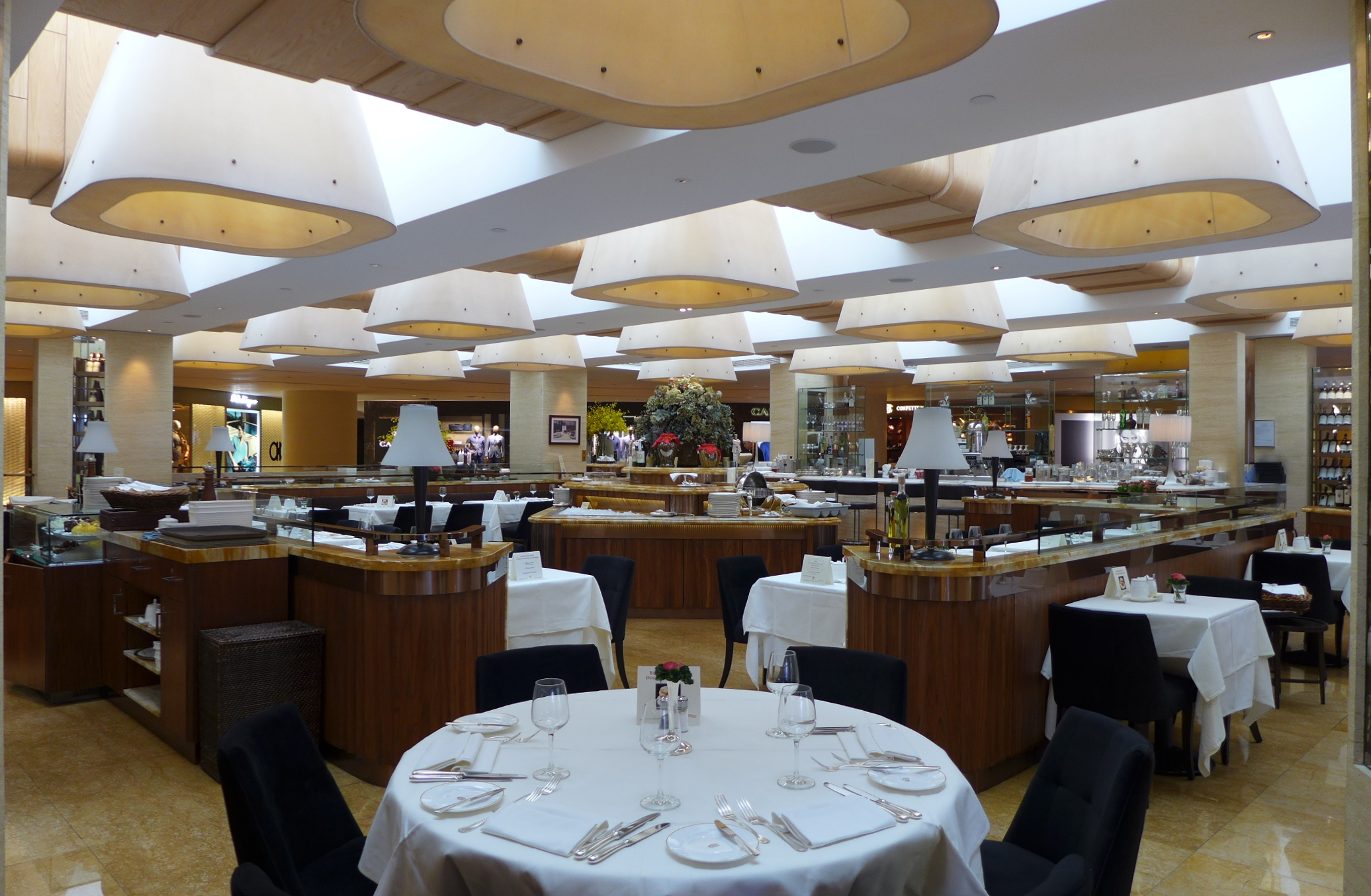 Pacific Place COVA restaurant